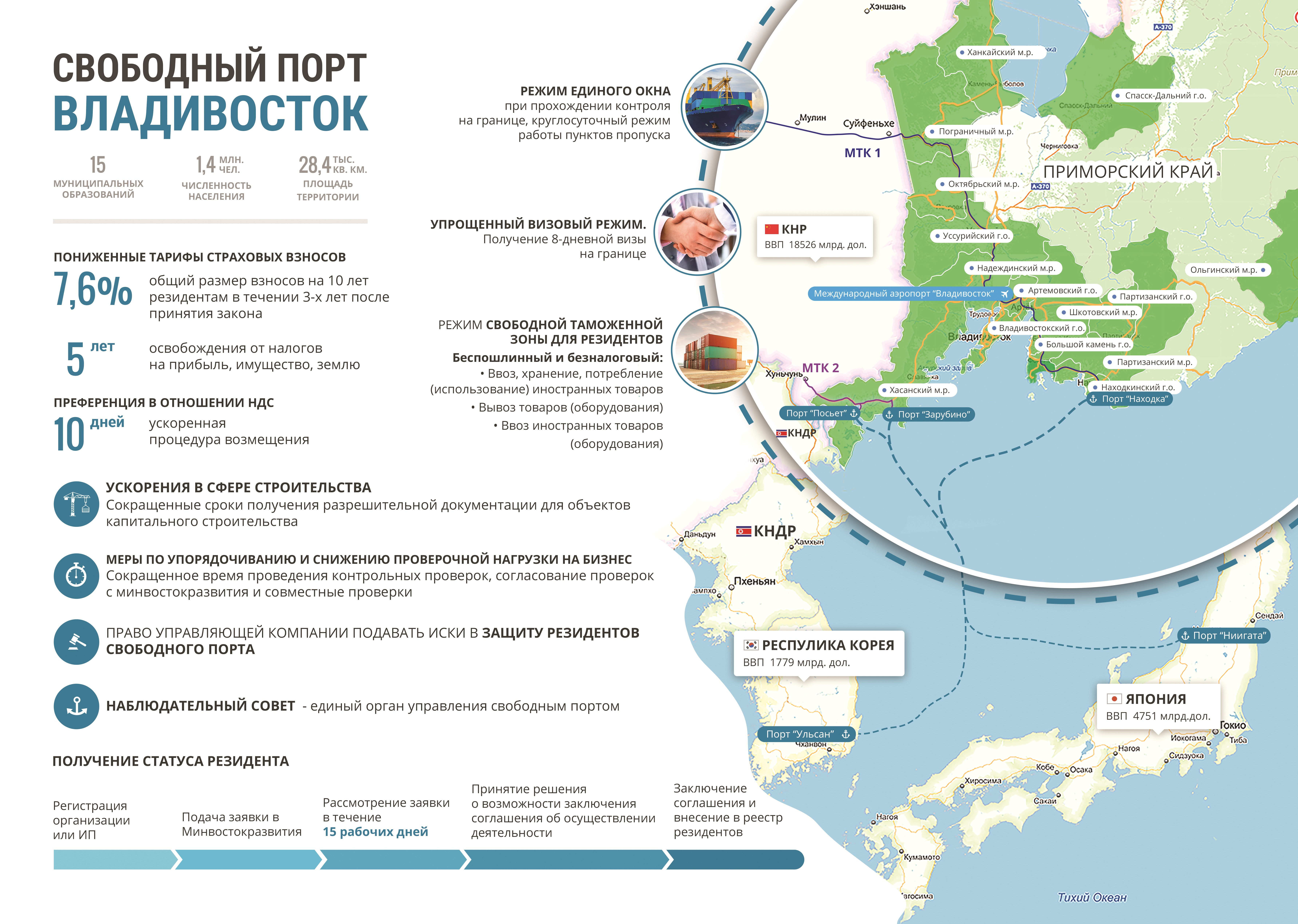 Инфографика по Свободному порту Владивосток